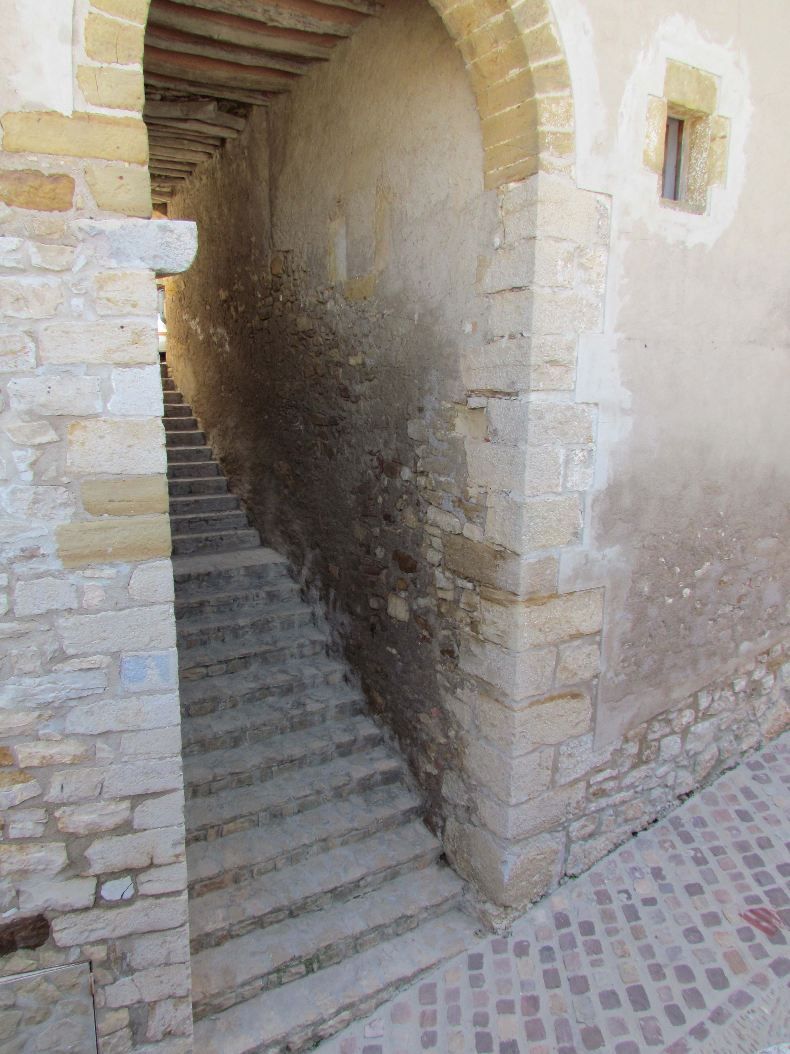 El Perxet a Culla, Alt Maestrat (País Valencià)